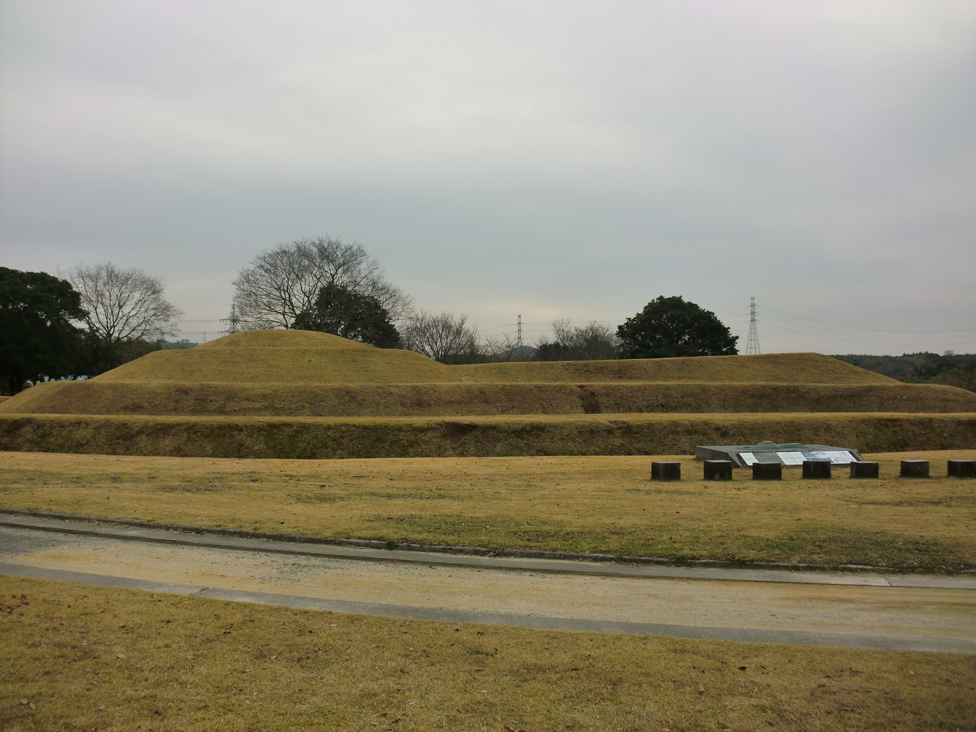 熊本市南区にある塚原（つかわら）古墳公園